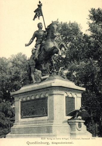 Quedlinburger Siegesdenkmal auf einer Ansichtskarte des Verlages von Zedler & Vogel, Nr. 859 (?), 1900, ungelaufen.